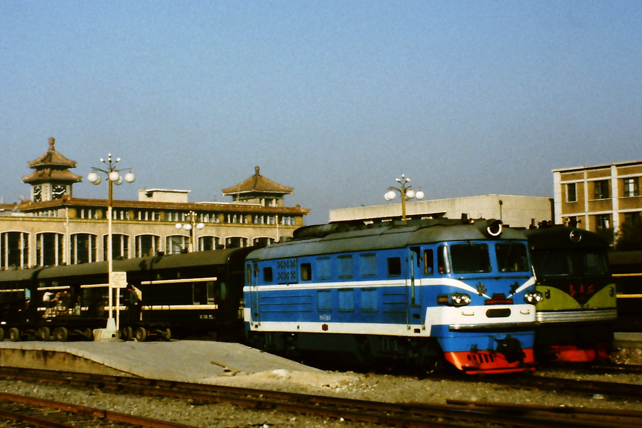 CNR Typ BJ (Beijing) im Hauptbahnhof Beijing